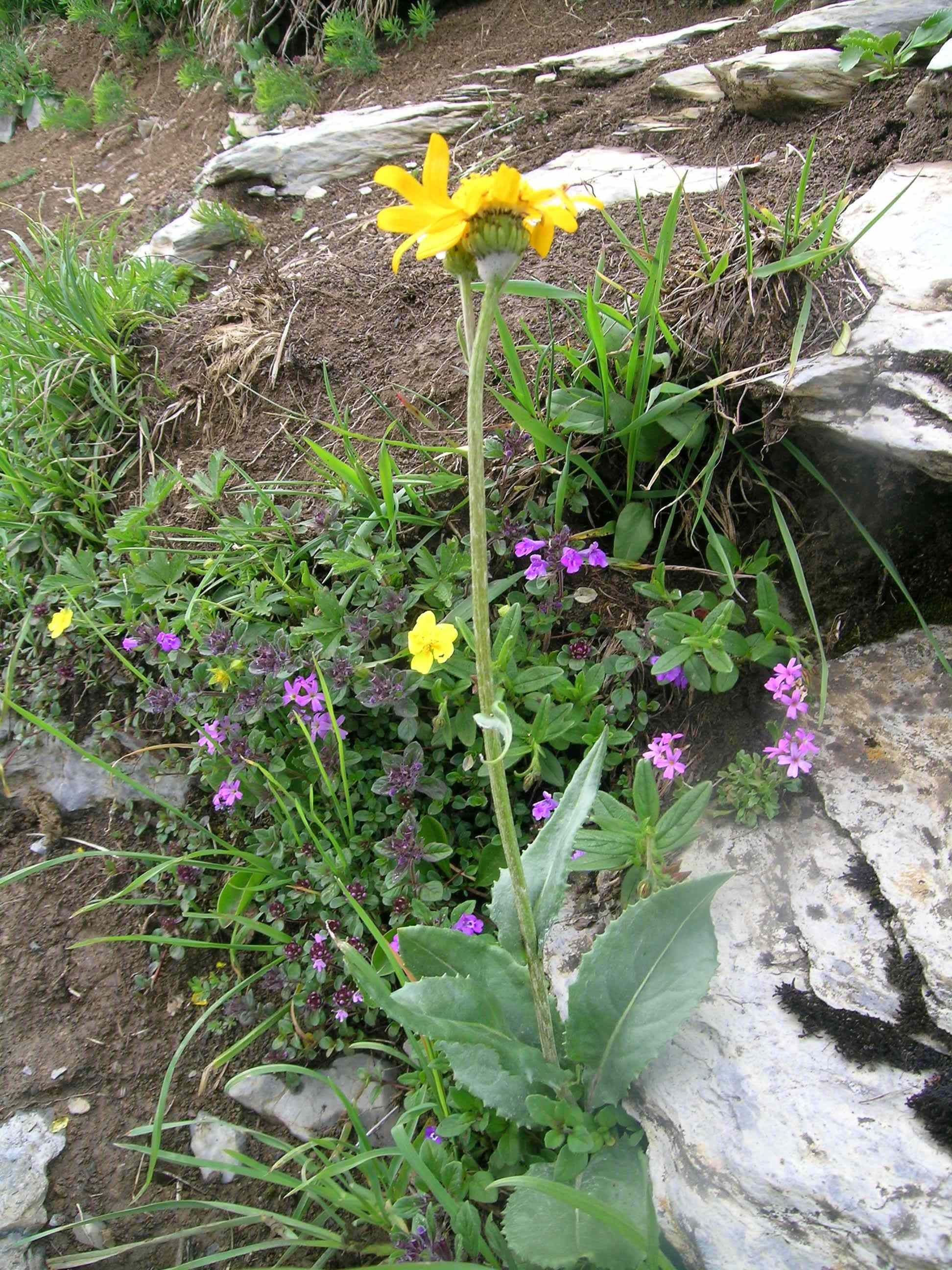 Senecio doronicum, Schynige Platte, Kanton Bern, Schweiz